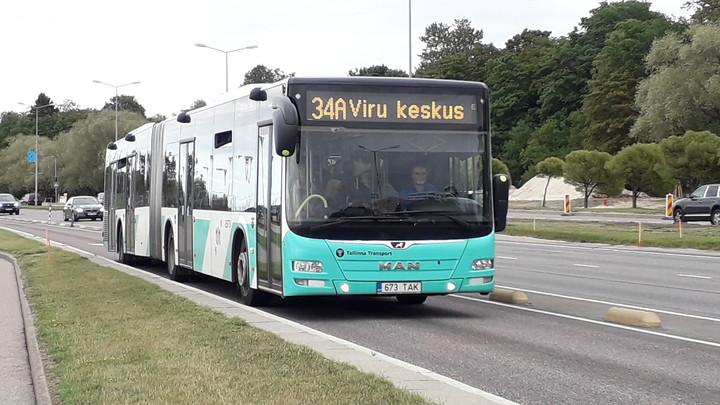 34A. Bussiliin sõitmas Pirita teel